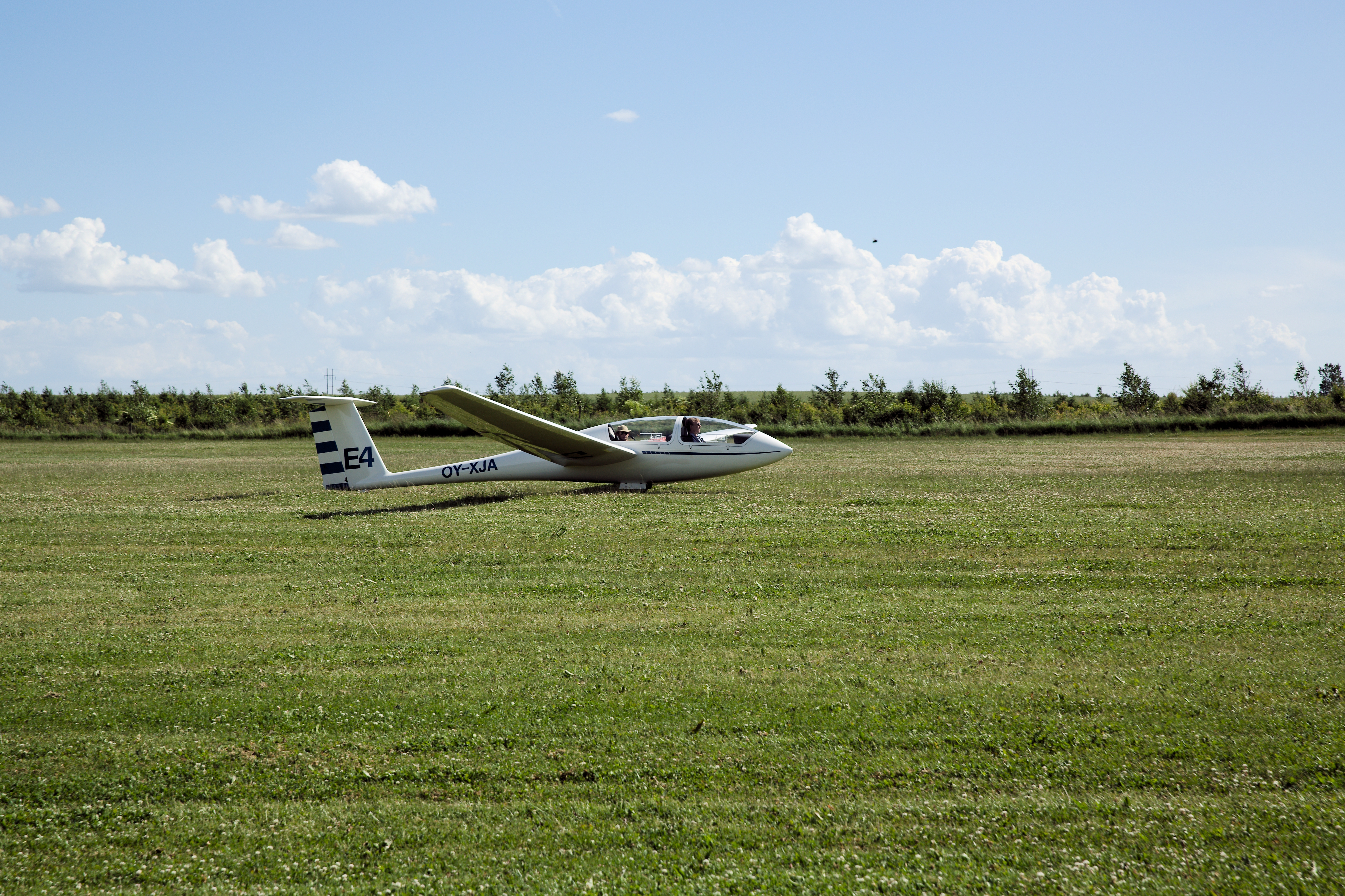 Svævefly under indflyvning på True Svæveflyveplads